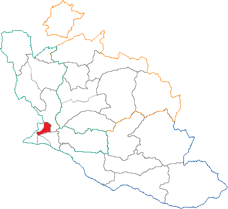 situation du canton de d'avignon nord dans le département de Vaucluse (France)